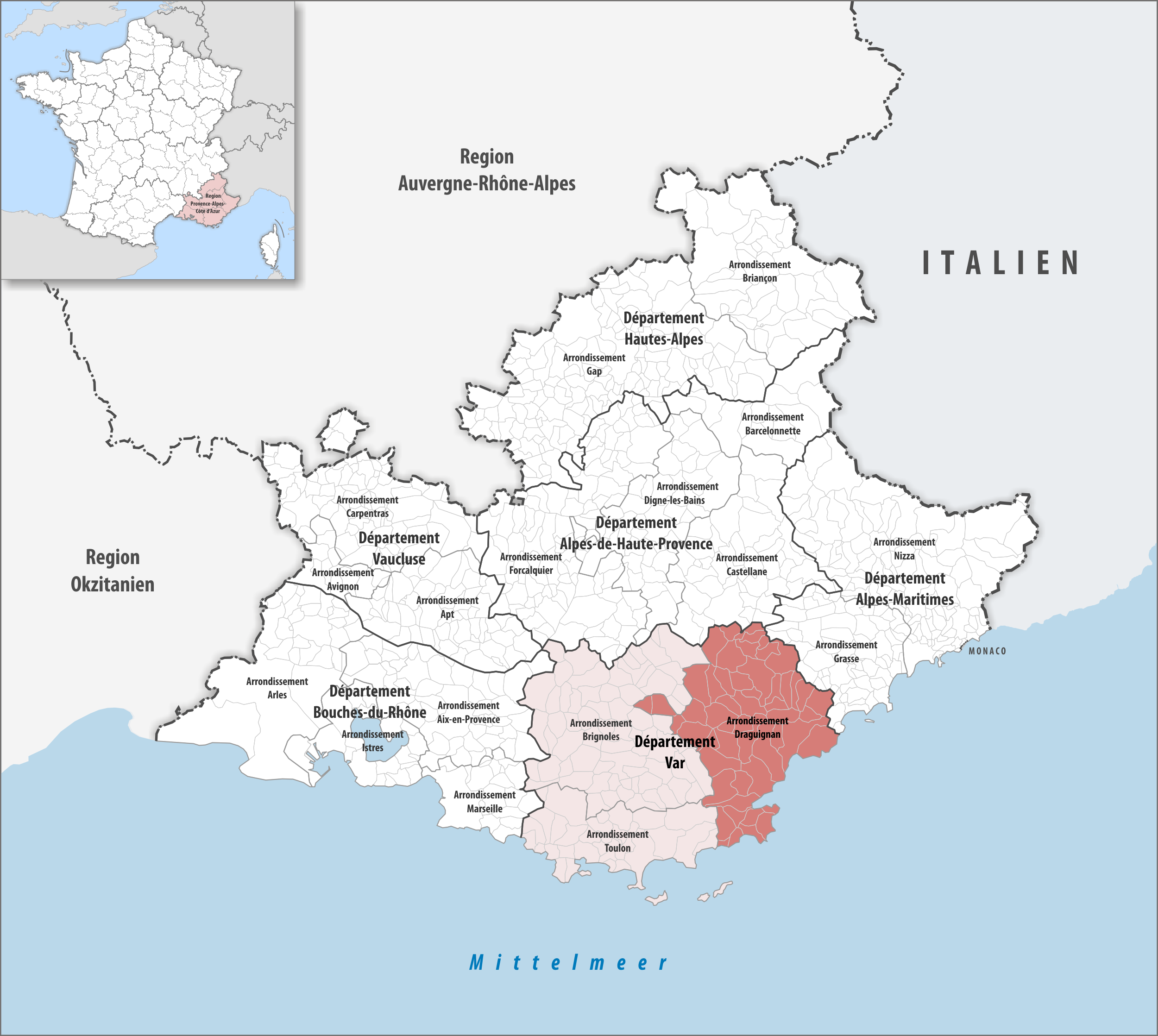 Lage des Arrondissements Draguignan